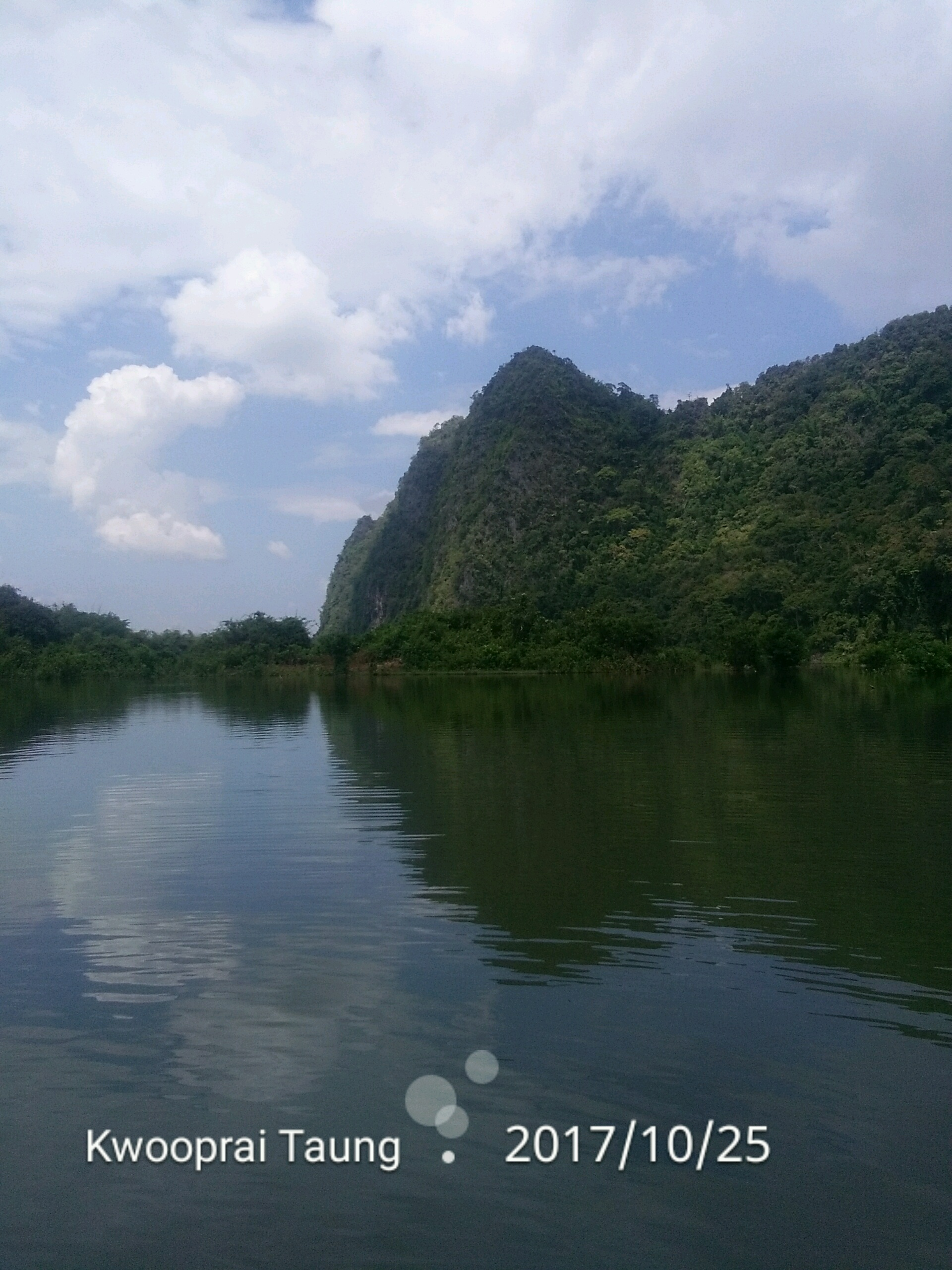 Kwooprai Taung